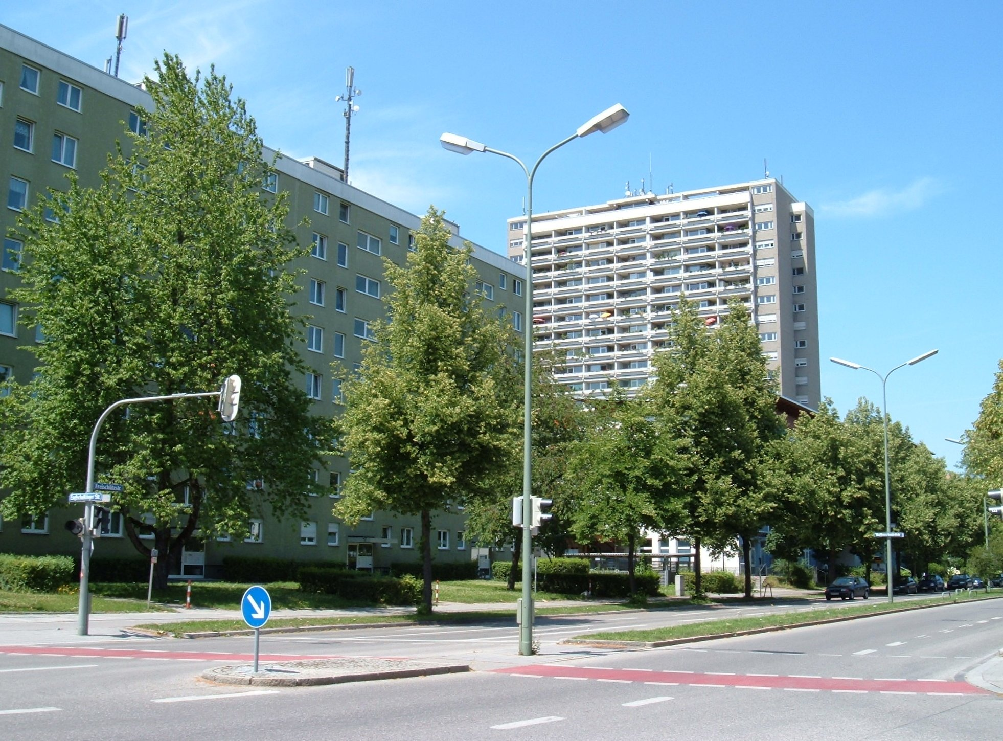 Hochhäuser in Englschalking, Fideoliopark